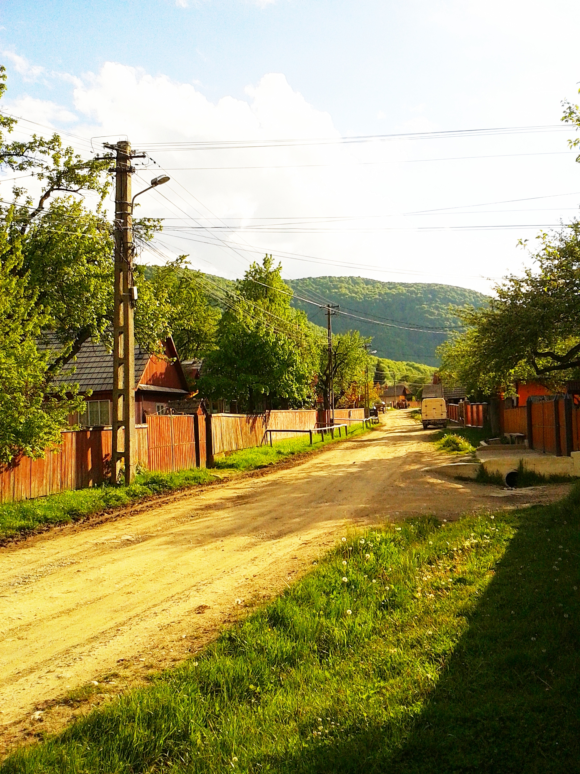 Satul Chichirău este un sat modest.